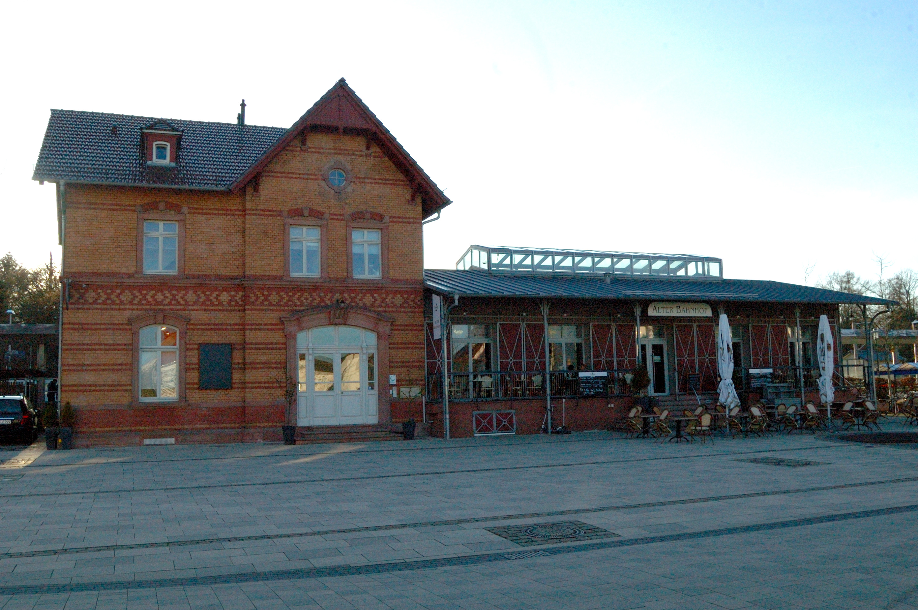 Bahnhof Heusenstamm Bahnhofsgebäude